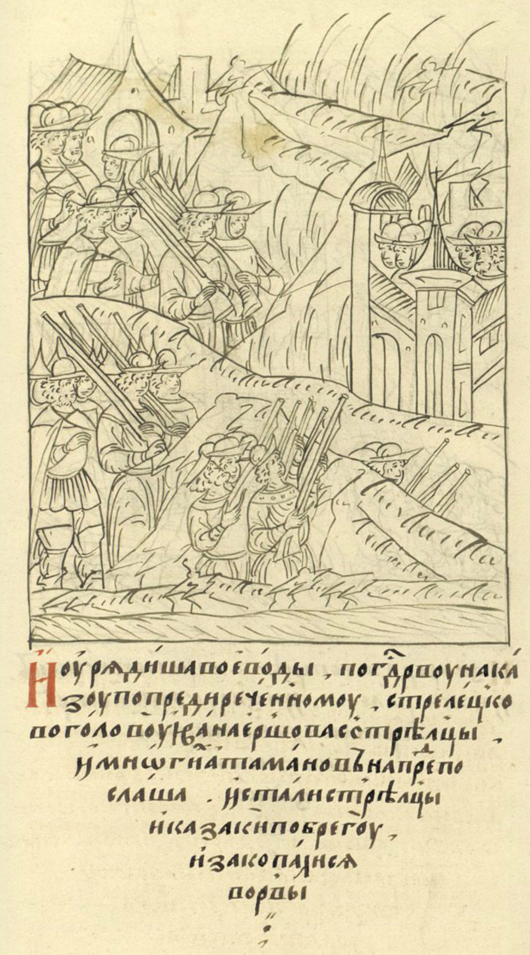 Лицевой летописный свод. 29 августа 1552 года. И урядиша воеводы по государеву наказу по предиреченному, стрелецково голову Ивана Ершова с стрелцы и многих атаманов напред послаша, и стали стрелцы и казаки по брегу и закопалися во рвы.